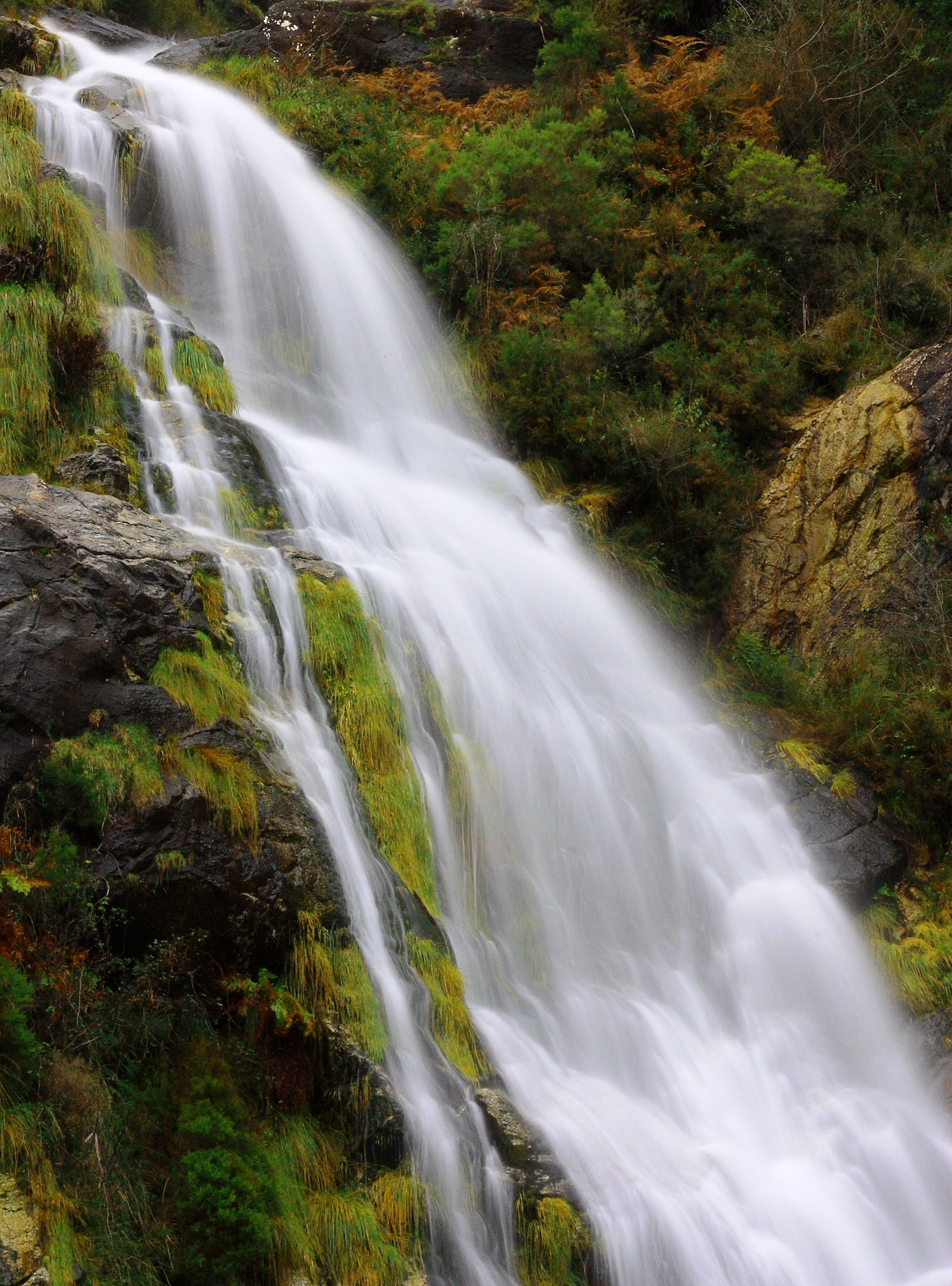 Fervenza dos Guerreiros, Cadarnoxo, Cures, Boiro